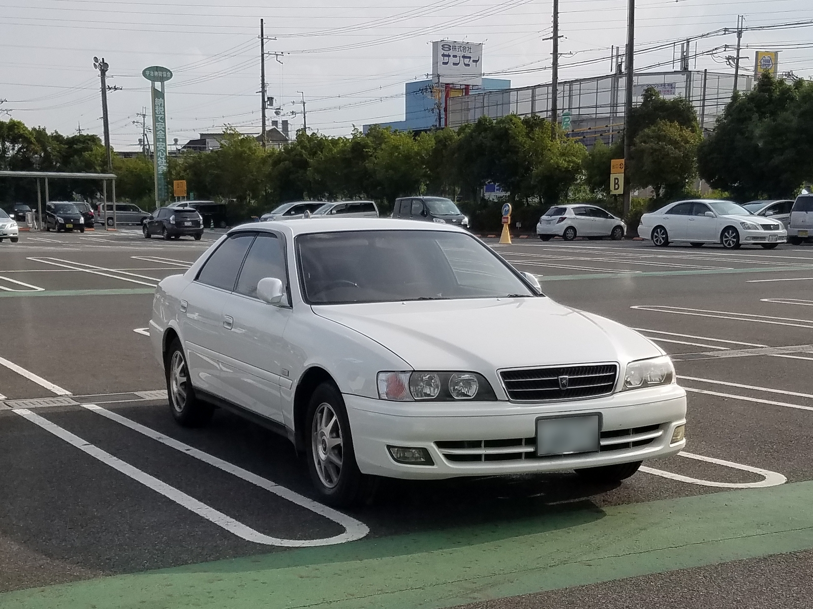 チェイサー 2.0アバンテロードリー(後期型)